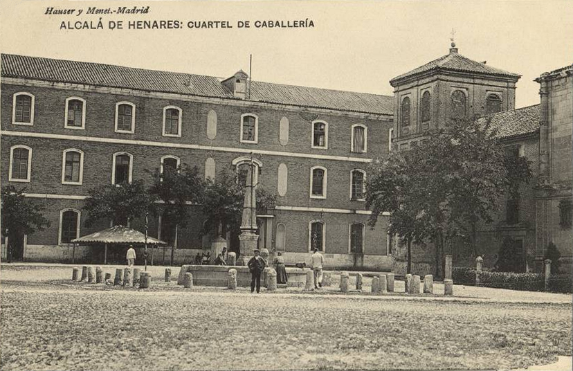 Fachada principal del antiguo Cuartel del Príncipe, construido en 1864 como cuartel de caballería; y rehabilitado en 2014 como Centro de Recursos para el Aprendizaje y la Investigación de la Universidad de Alcalá. Tarjeta postal de Hauser y Menet publicada en Madrid hacia 1912, en cartulina blanco y negro de 9 x 14 cm. Texto en el anverso: "Hauser y Menet.-Madrid / ALCALÁ DE HENARES: CUARTEL DE CABALLERÍA".